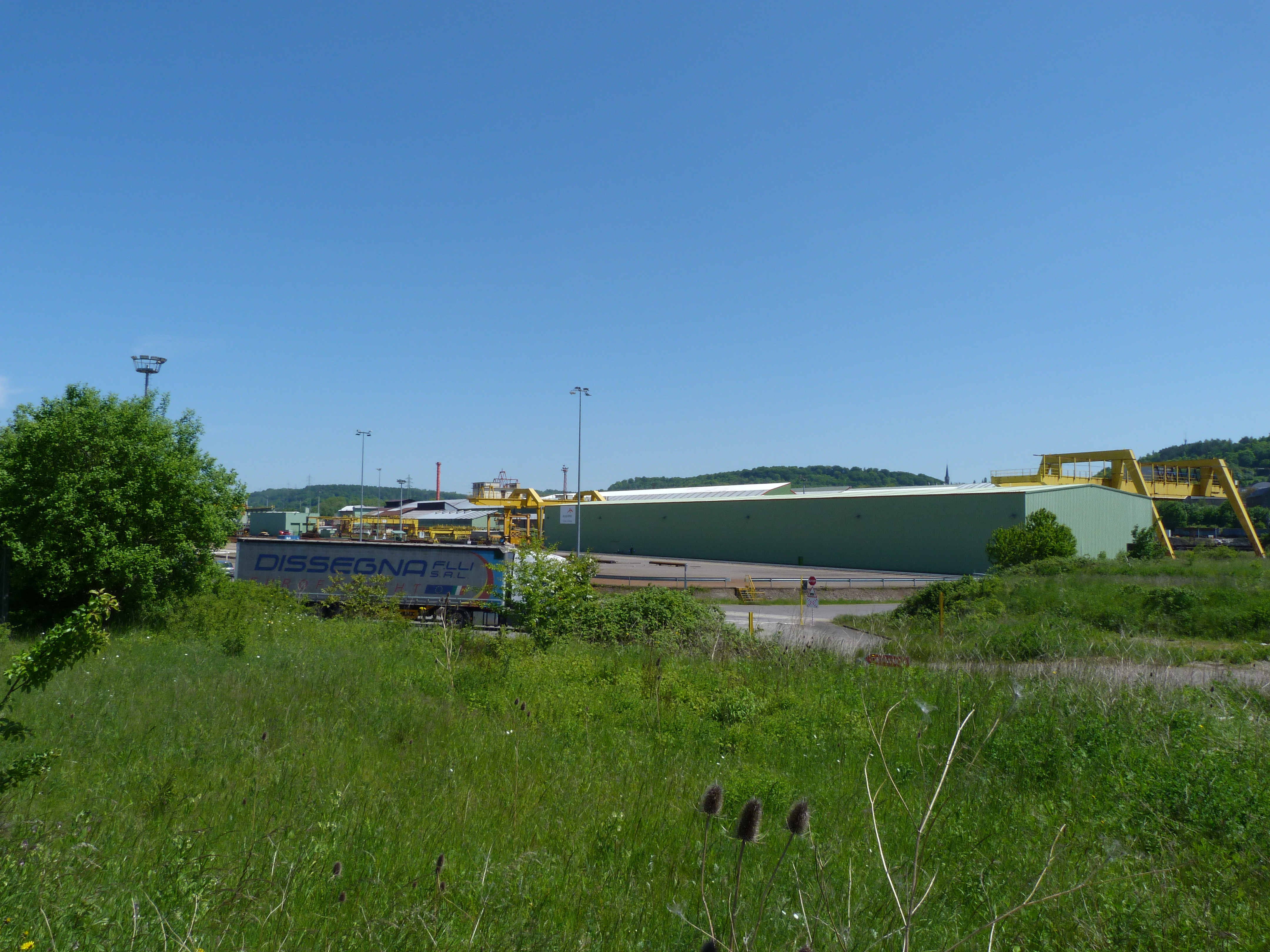 Usine Arcelor Mittal de Rodange vue depuis l'Avenue de l'Europe en 2013